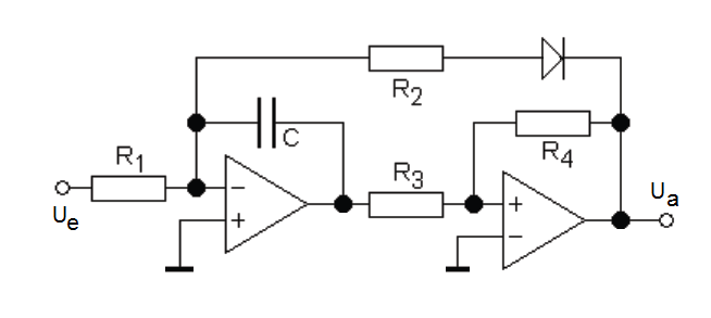 Schaltung eines Spannungs-Frequenz-Wandlers mit zwei OPs.